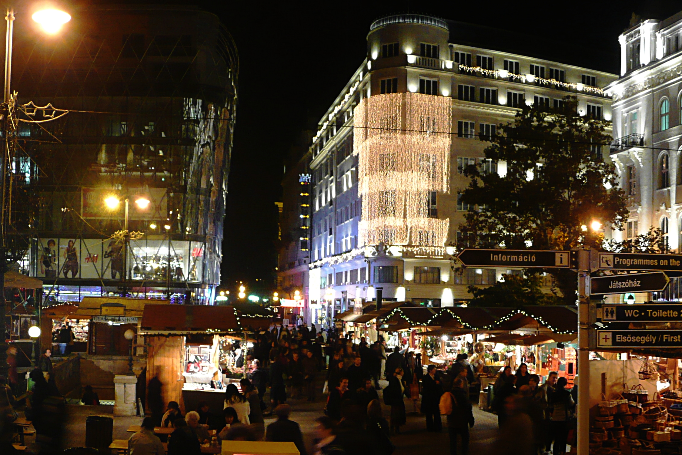 Budapest, Vörösmarty tér (2009 karácsonyi vásár) és a Futura-ház